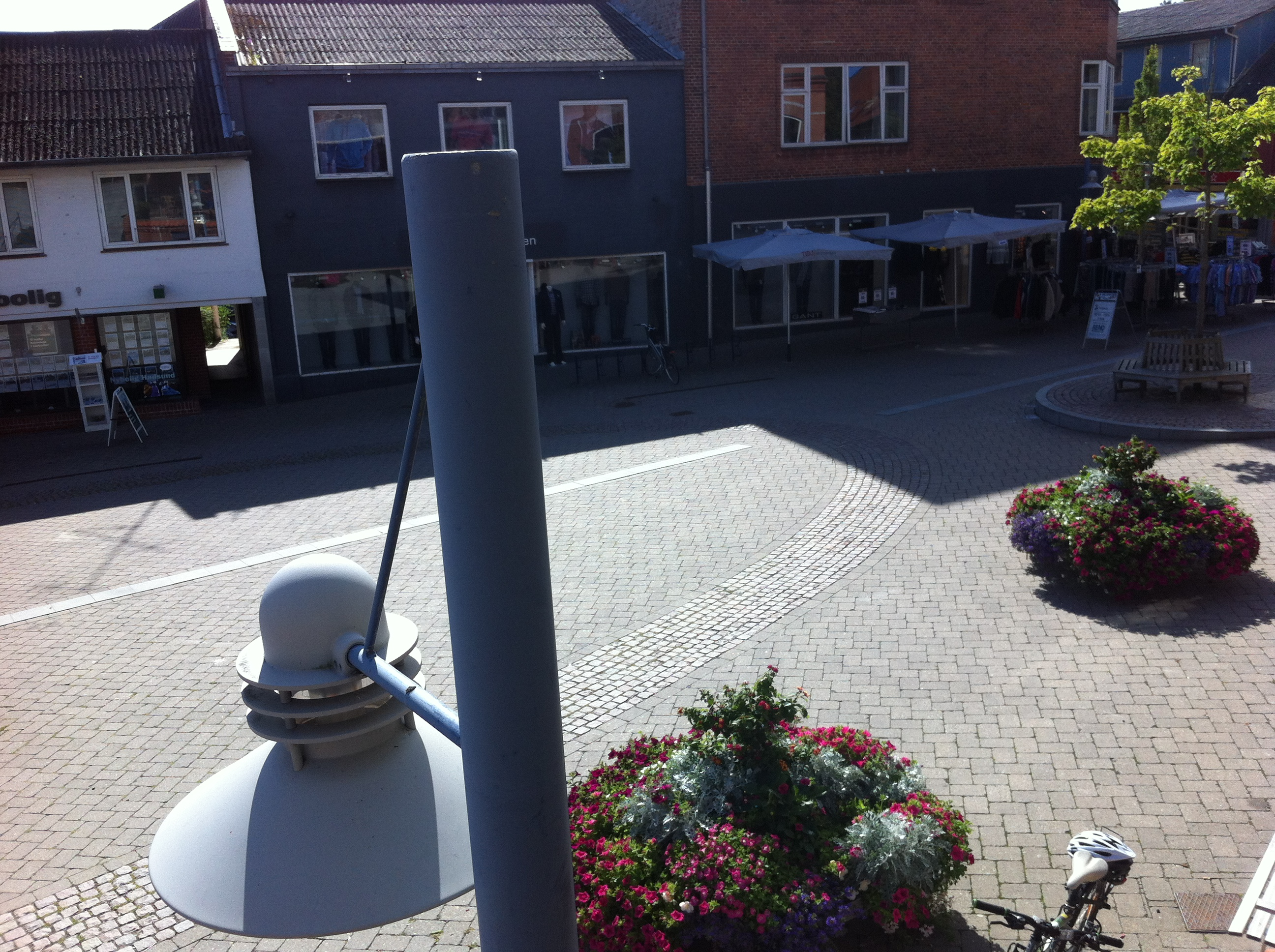 Hadsund Torv set mod Storegade (Gågaden)